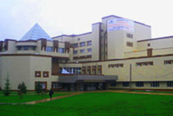 Фасад здания корпуса "А" Сибирского федерального университета